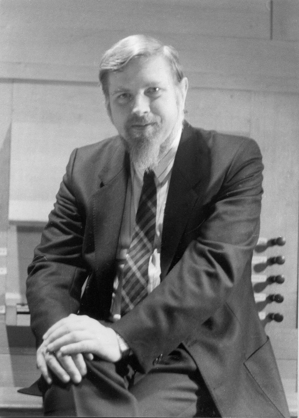 Harald Vogel, Organist und Organologe